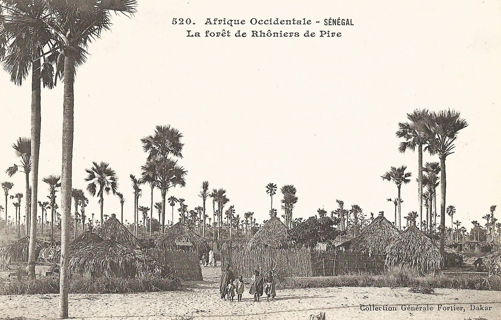 François-Edmond Fortier, Sénégal. Forêt entre Pire et Meckhé. Afrique Occidentale - Sénégal.